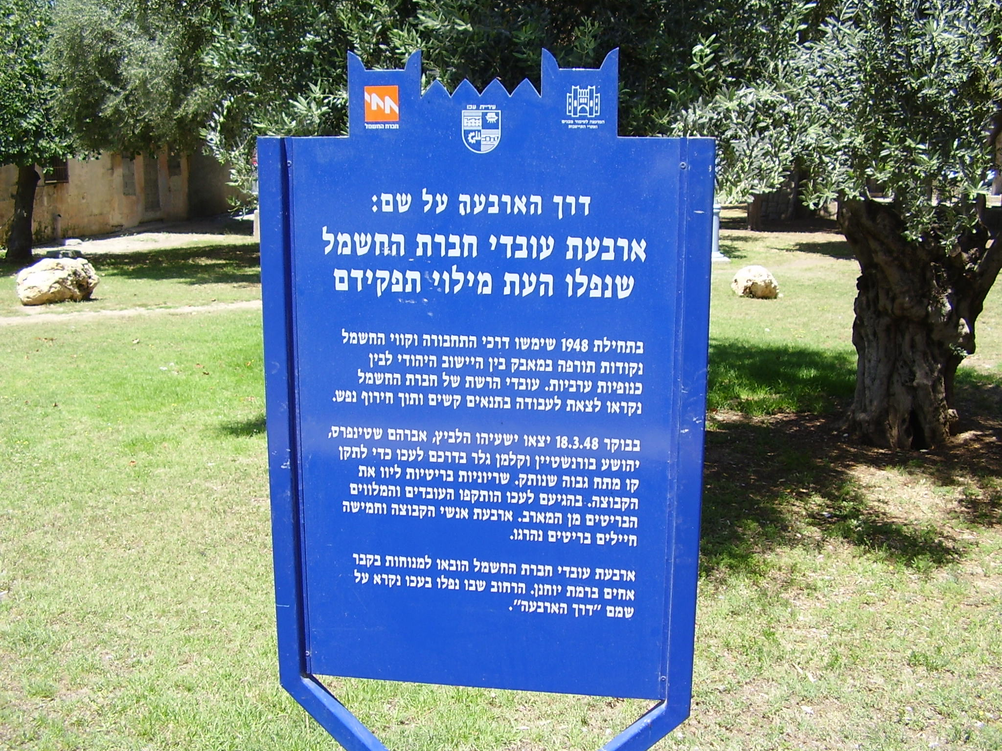 שלט הסבר ב"דרך הארבעה בעכו רישיון נוצר על ידי משתמש:Avi1111